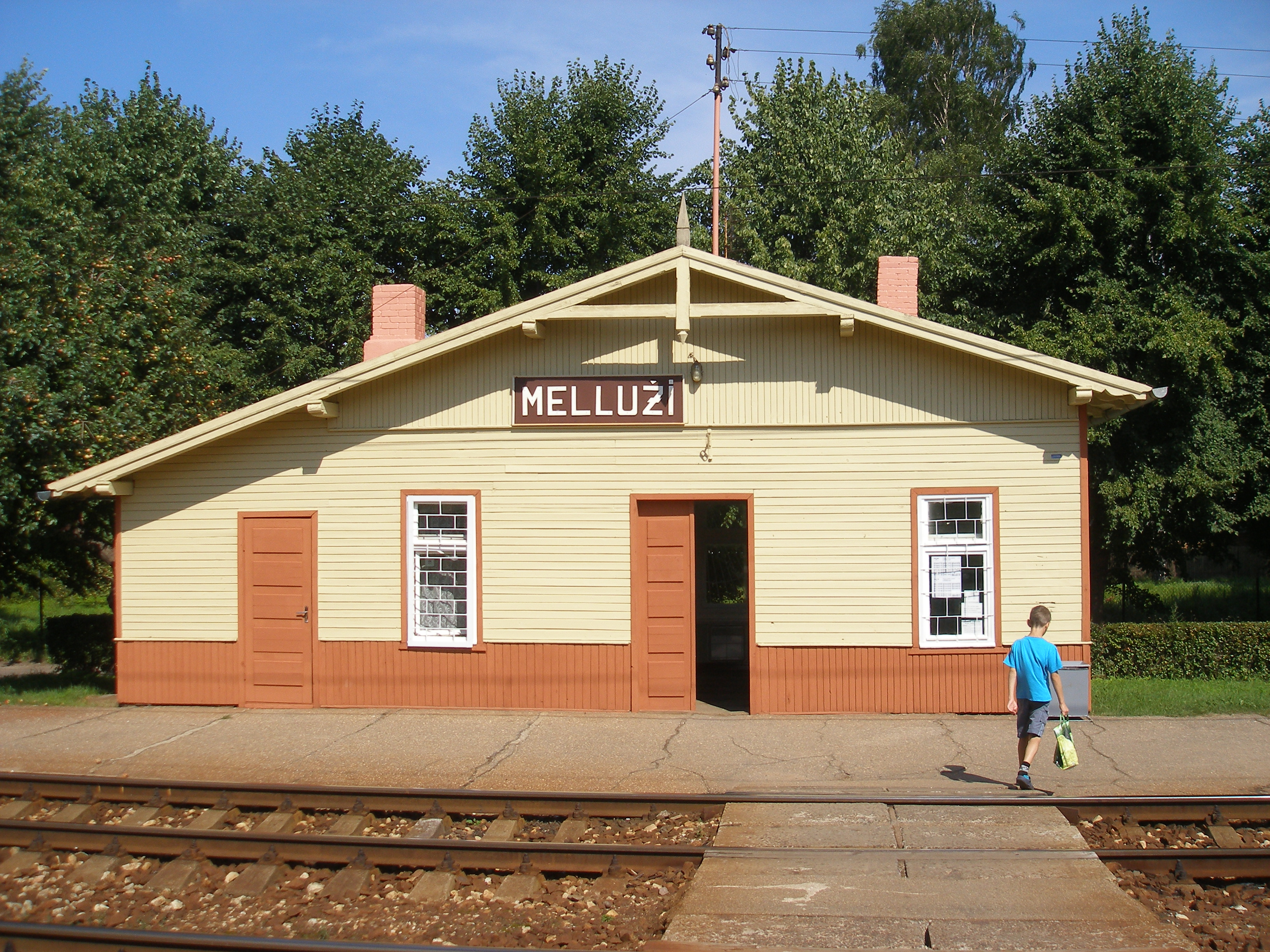 Mellužu stacijas ēka.